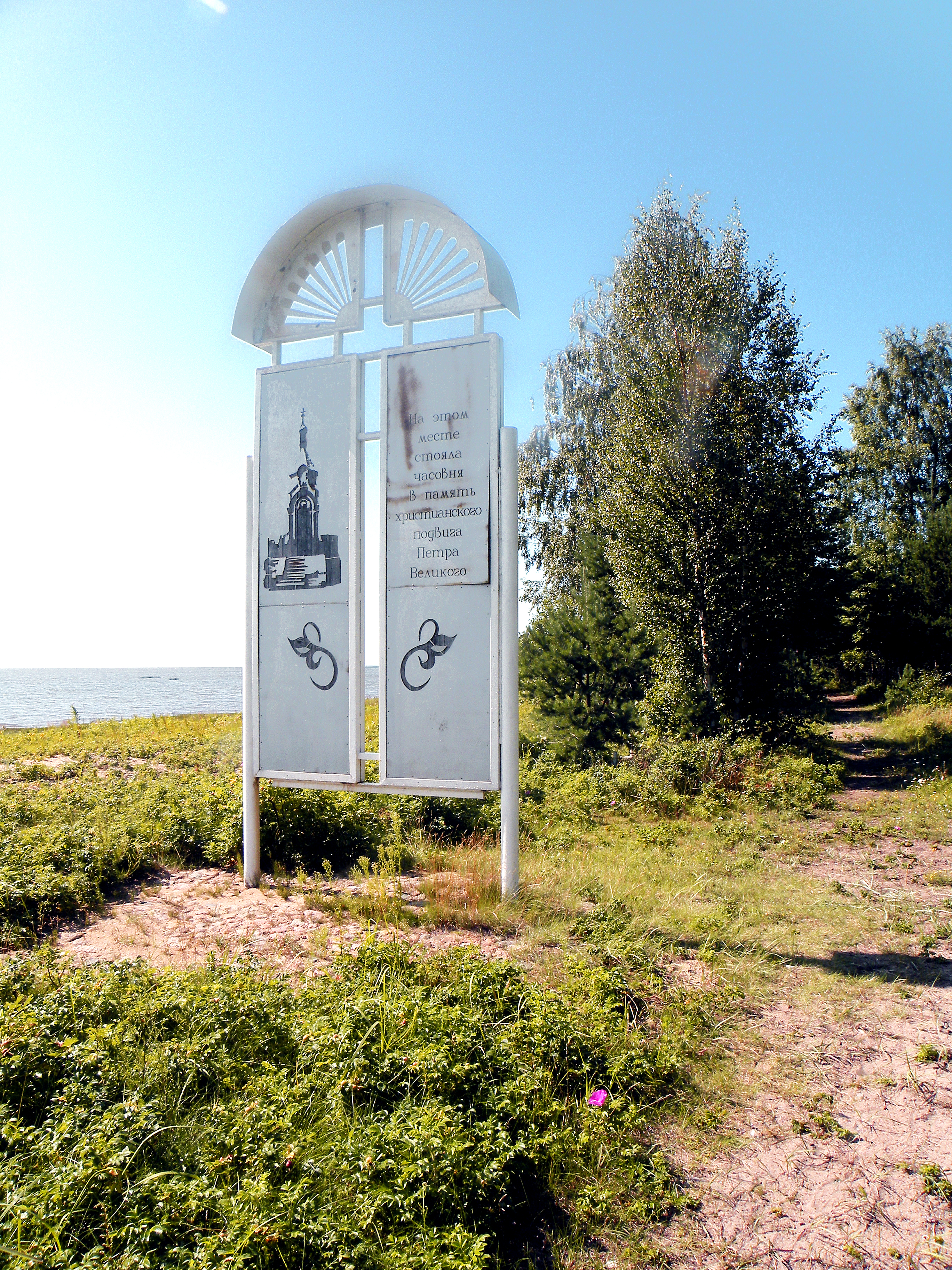 Лахта.Памятная_доска_на_месте_подвига_Петра_Первого.jpg